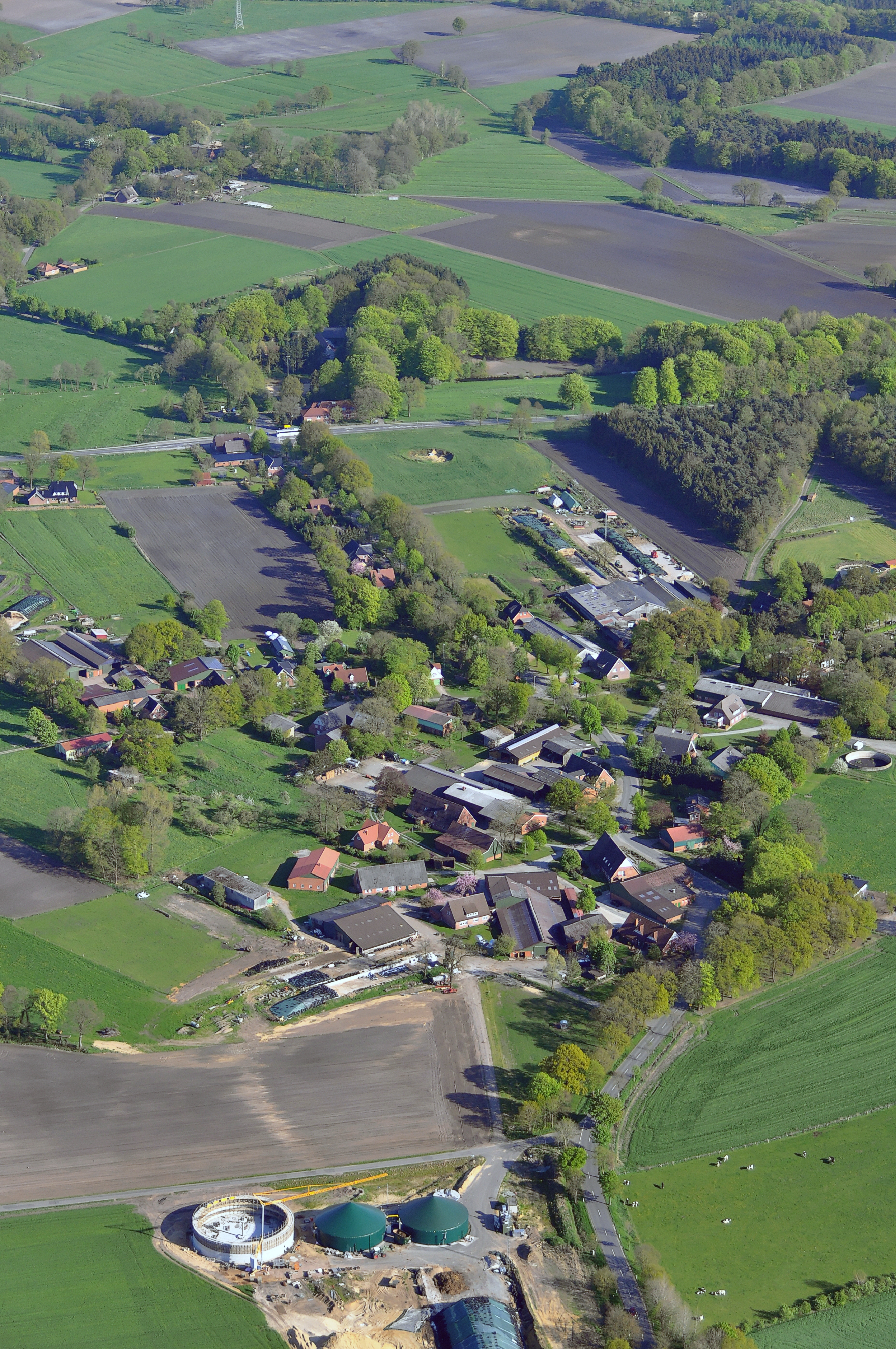 Luftbilder von der Nordseeküste 2012-05